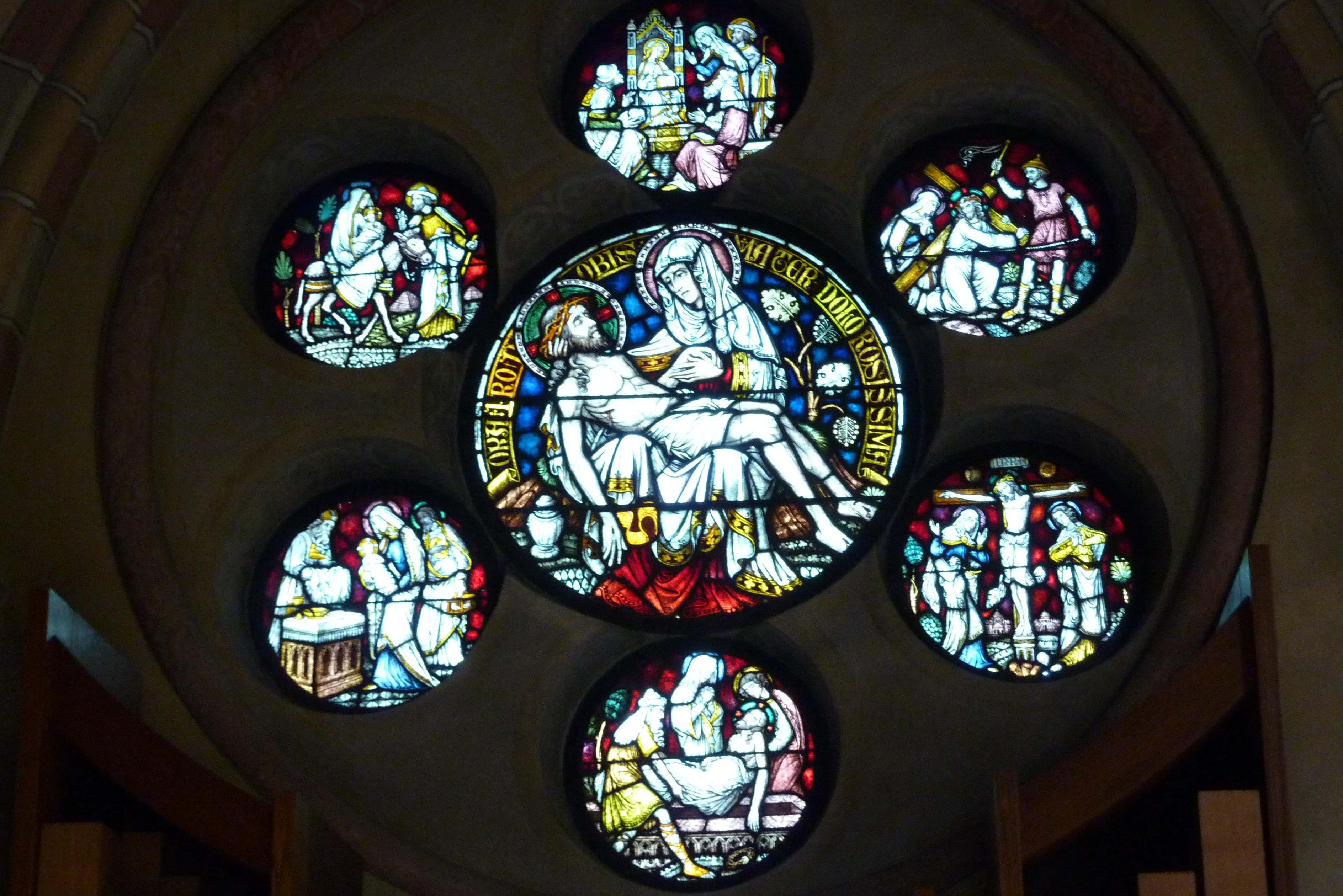 Ausschnitt eines Bleiglasfensters (ausgeführt um 1900 von der Glasmalerei Schneiders und Schmolz) in der Markuskapelle in Altenberg, Darstellung: 7 Schwerzen Mariens (Fenster nIV), hergestellt 1899/1900 von der Glasmalerei Schneiders & Schmolz in Köln (siehe Uwe Gast, Daniel Parello, Hartmut Scholz: Der Altenberger Dom (Monumente der Glasmalerei 2), Schnell & Steiner, Regensburg 2008, S. 83-89, ISBN 978-3-7954-1960-8)